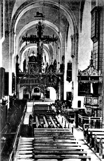 Dom (innen)